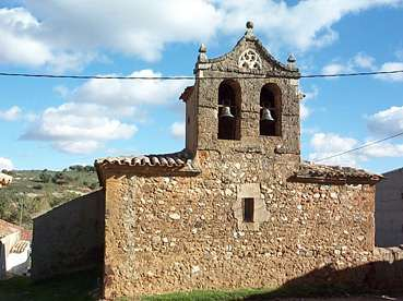 Ermita de Ntra. Sra. del Rosario